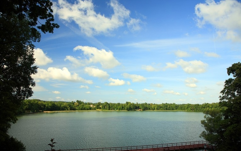 Ublik, województwo warmińsko-mazurskie, powiat piski, gmina Orzysz